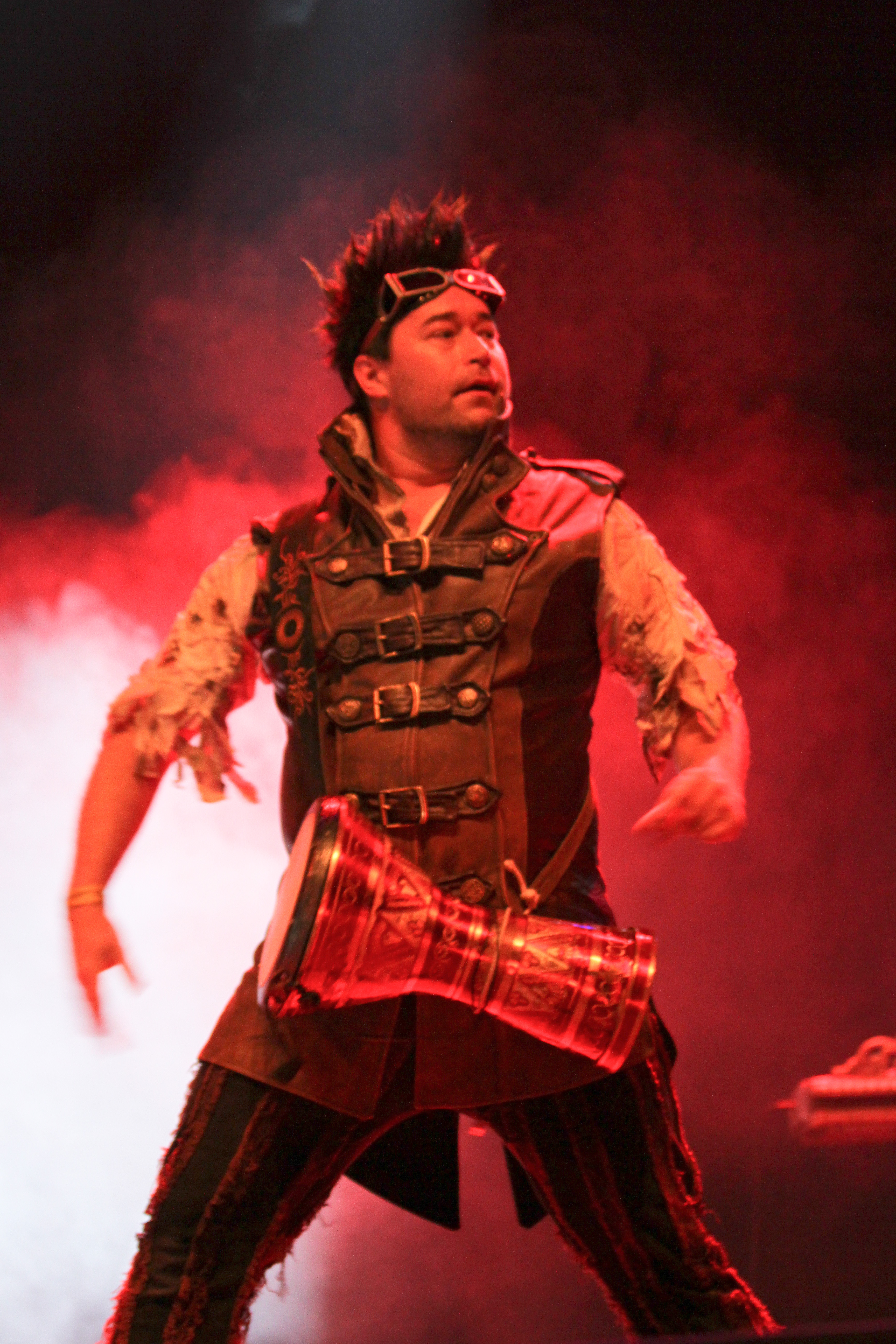 Abney Park auf dem Wave-Gotik-Treffen 2013 in Leipzig, Agra-Halle.